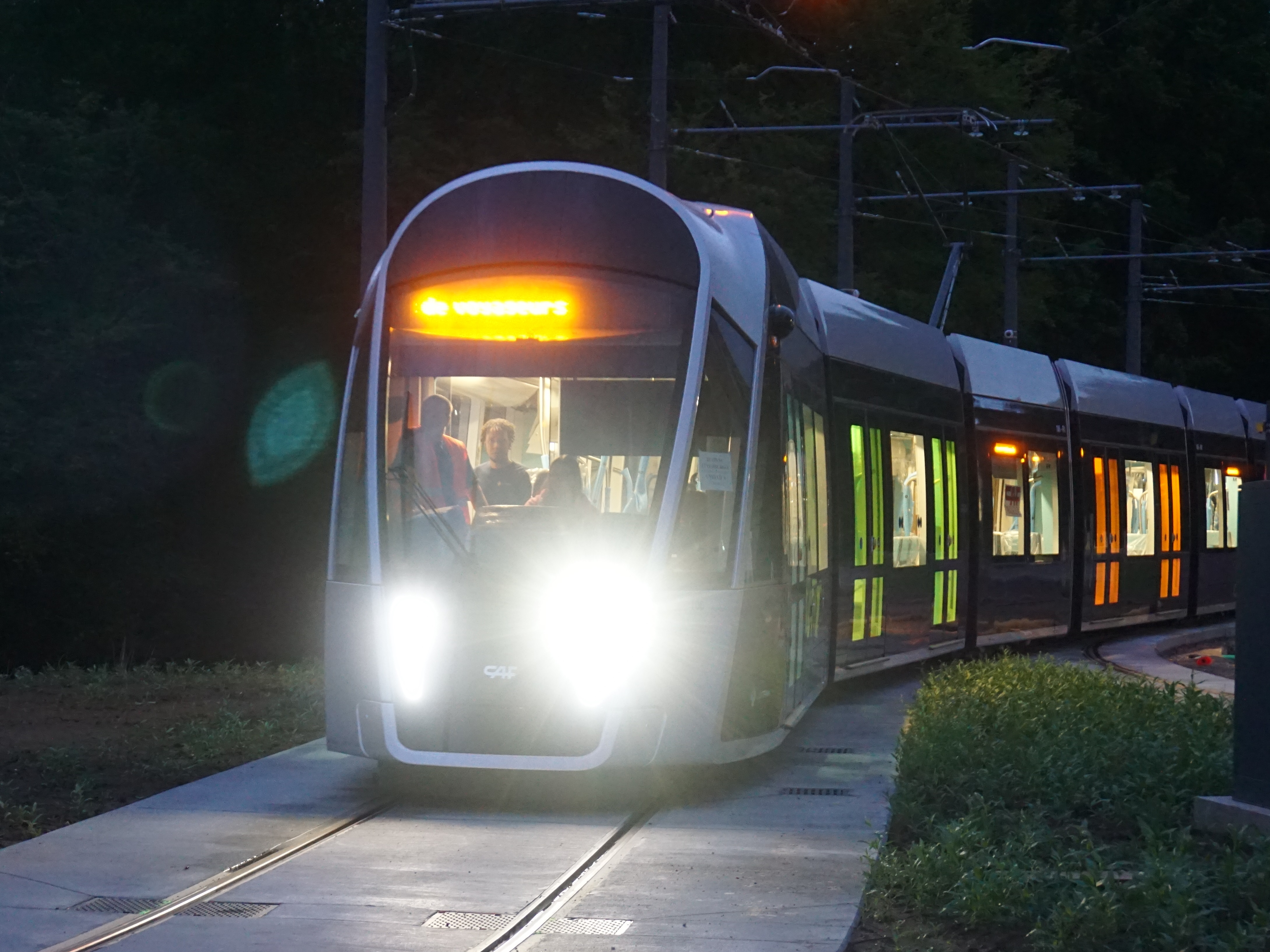 Luxembourg, essais techniques nocturnes. Sortie du CRM